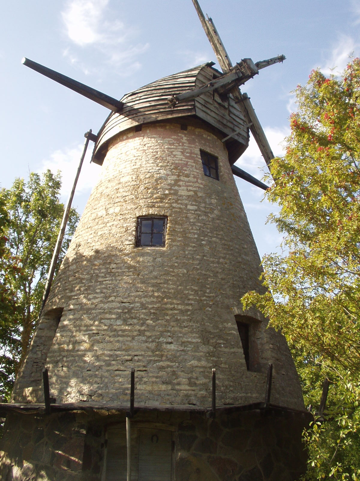 Uuetalu talu tuuleveski